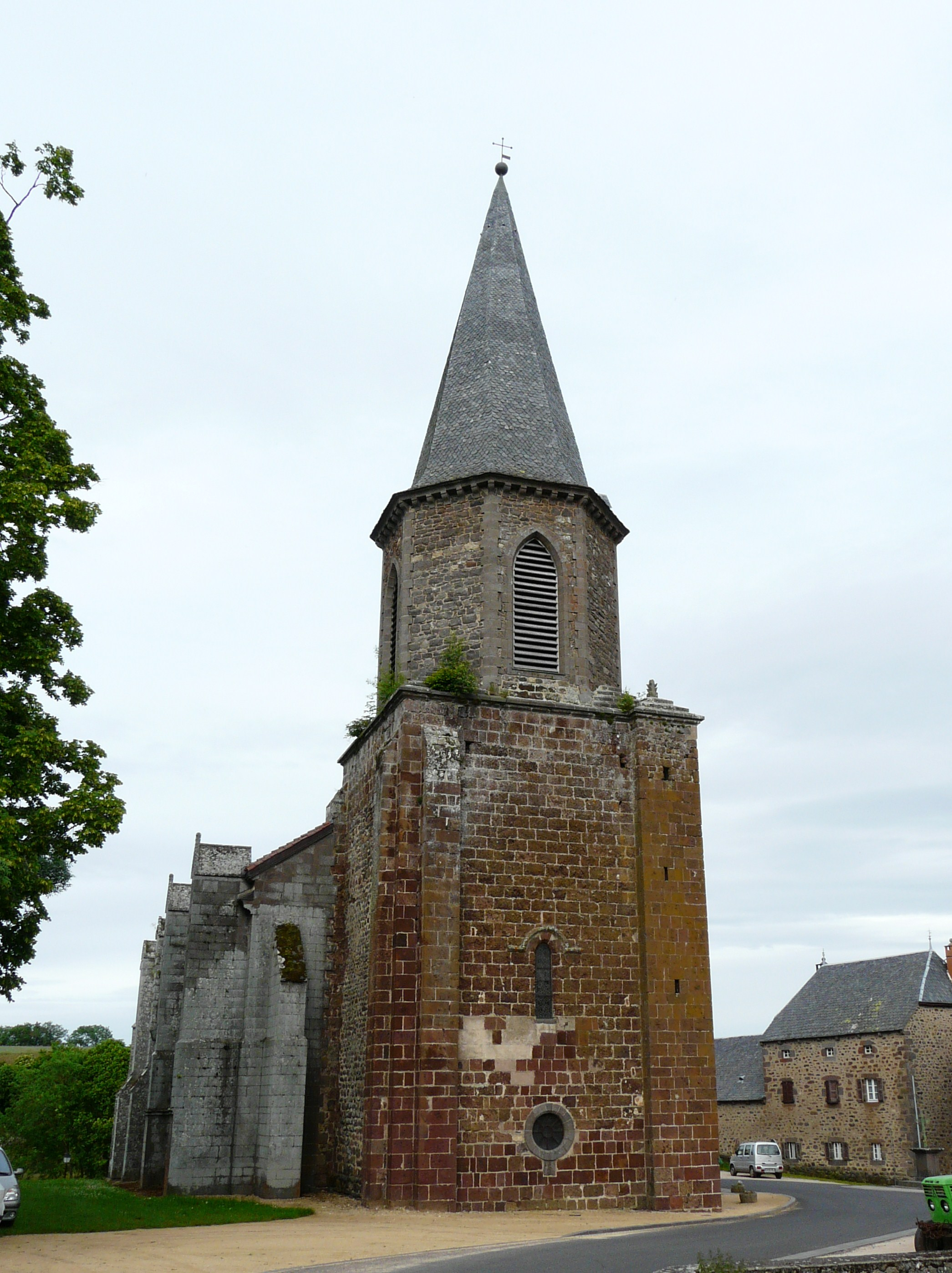 L'église de Villedieu, Cantal, France.